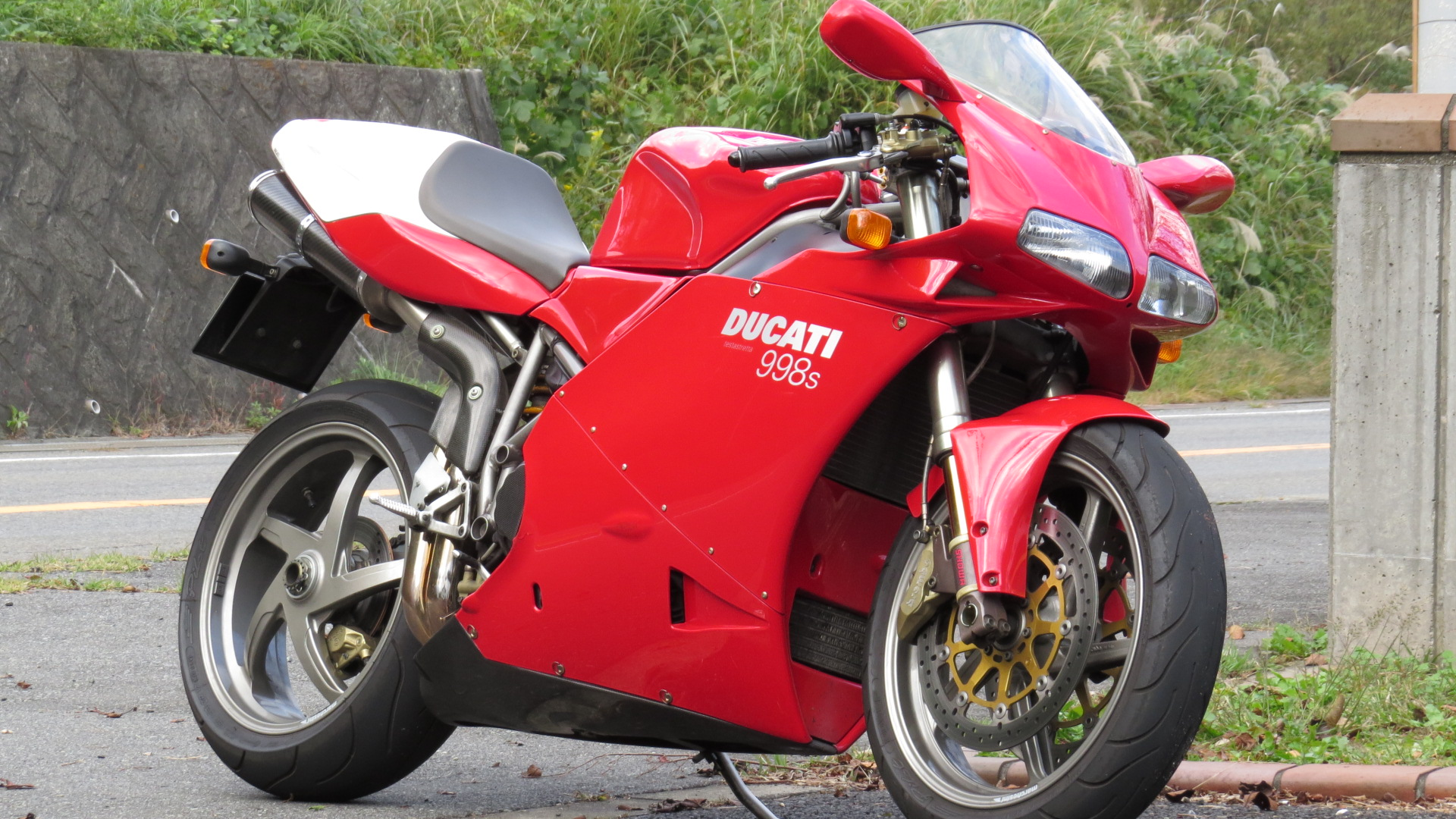 DUCATI 998s